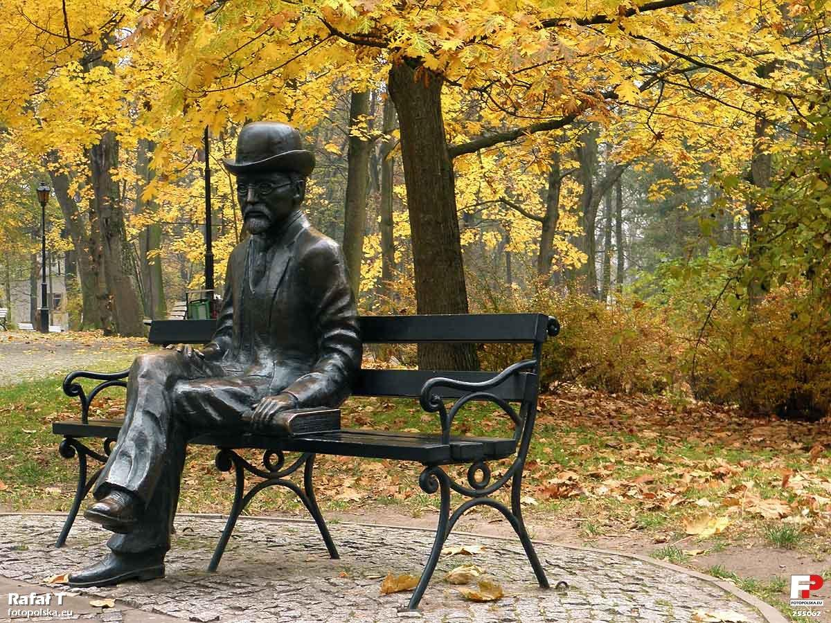 Ławeczka Bolesława Prusa autorstwa Stanisława i Zbigniewa Strzyżyńskich.